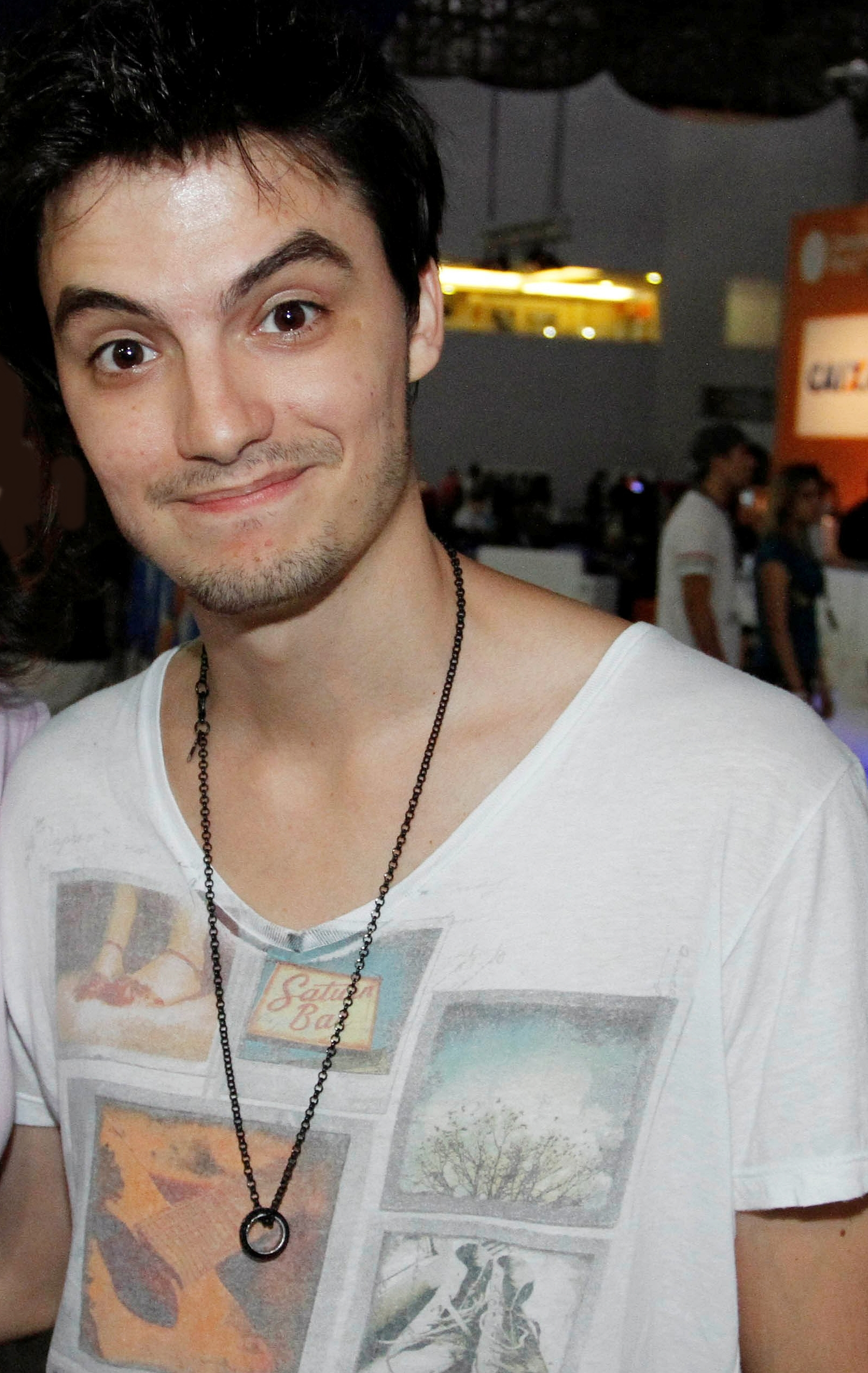 Felipe Neto no Campus Party Brasil 2012. Foto: Flávia de Quadros.